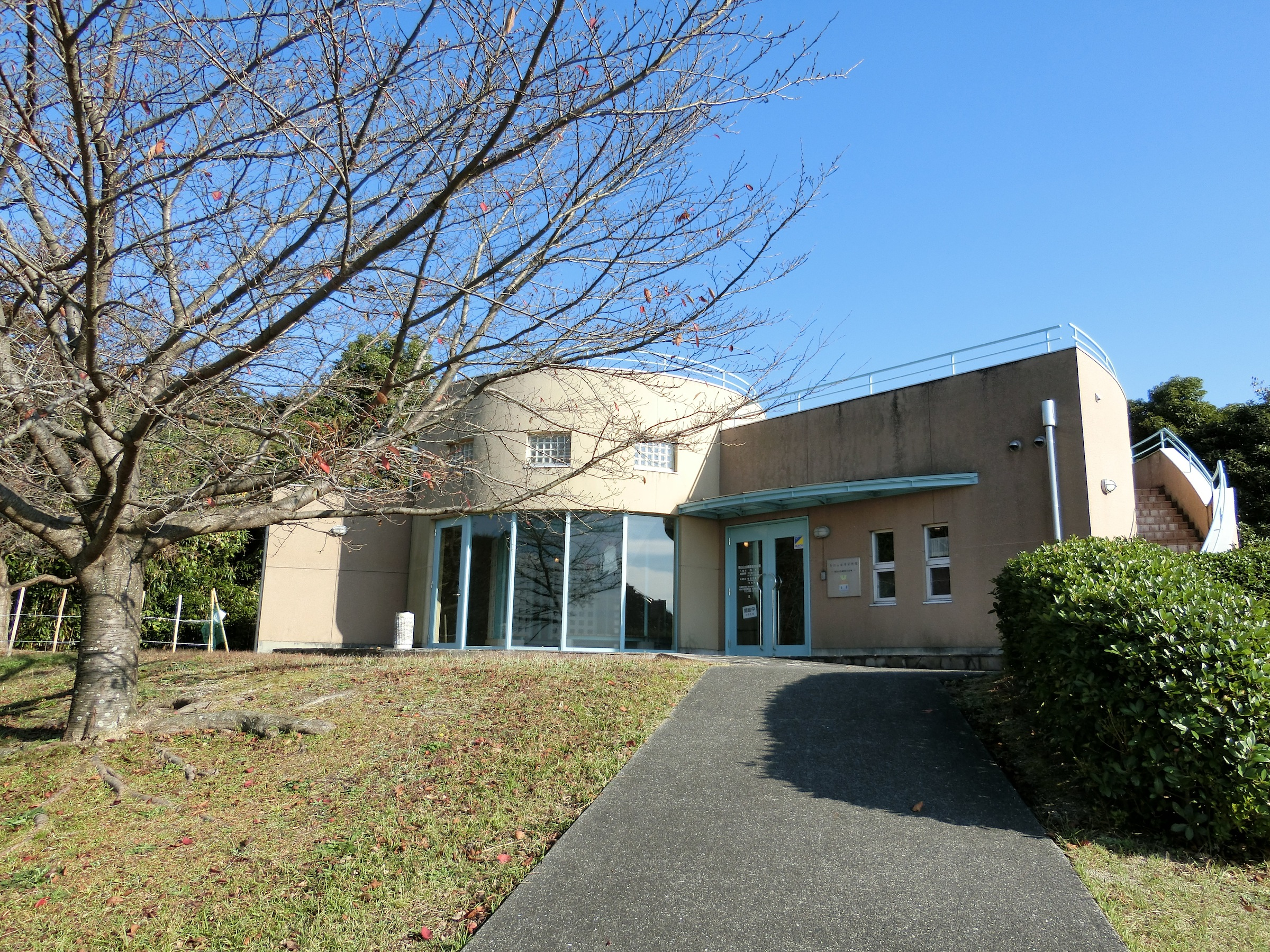 柳井茶臼山古墳の資料館（柳井市）。